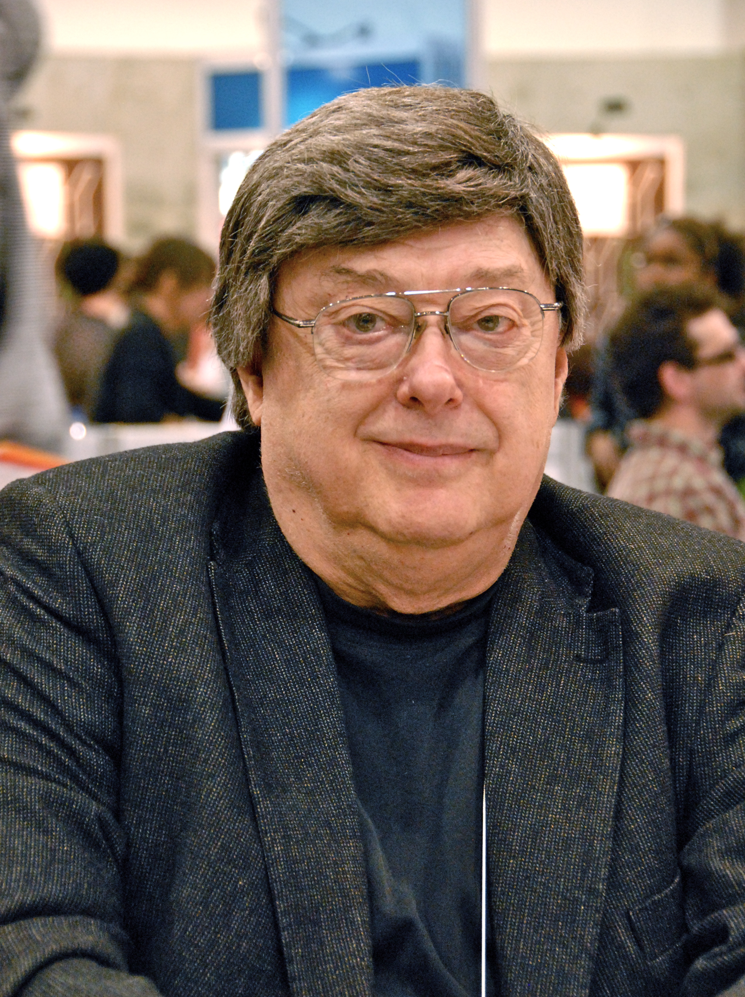 Normand Lester, lors du Salon international du livre de Québec 2012